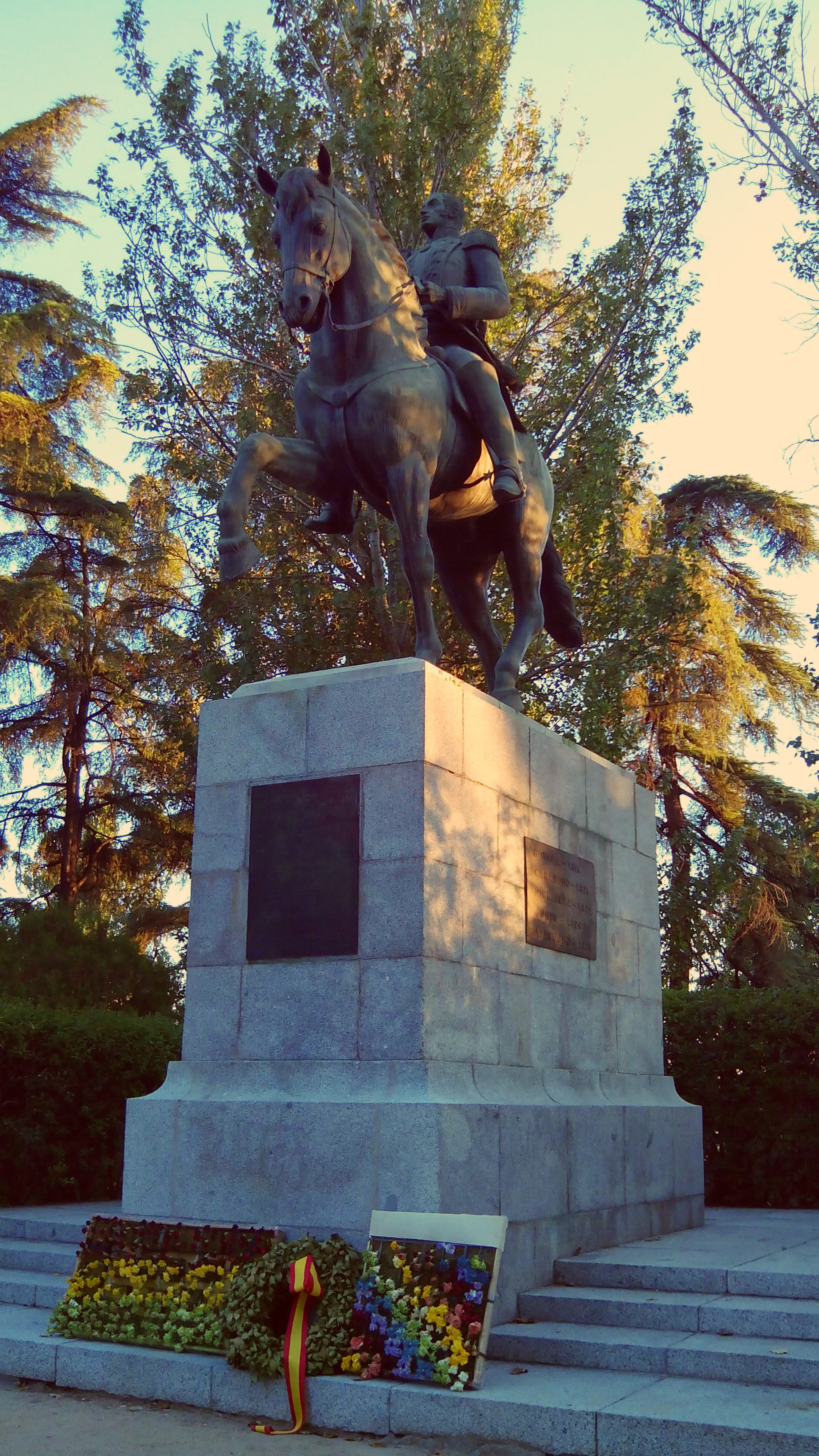 Estatua de Simón Bolívar donada por el gobierno Venezolano a la ciudad de Madrid.